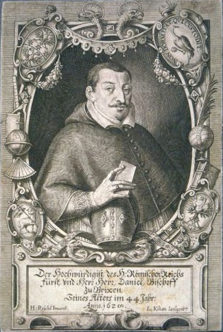 Daniel Zen, Fürstbischof von Brixen